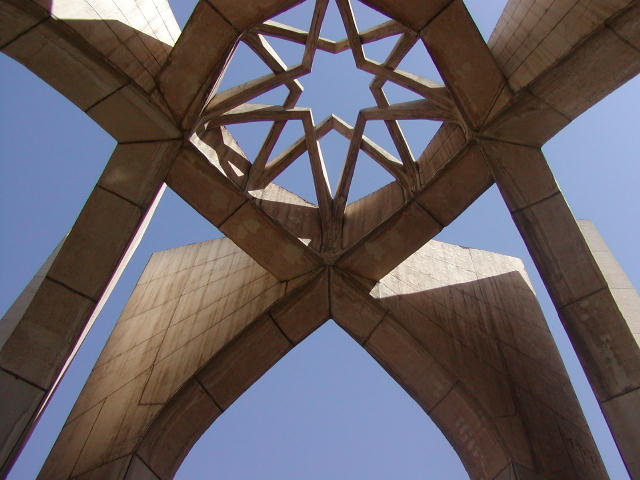 Tabriz Poets Tomb